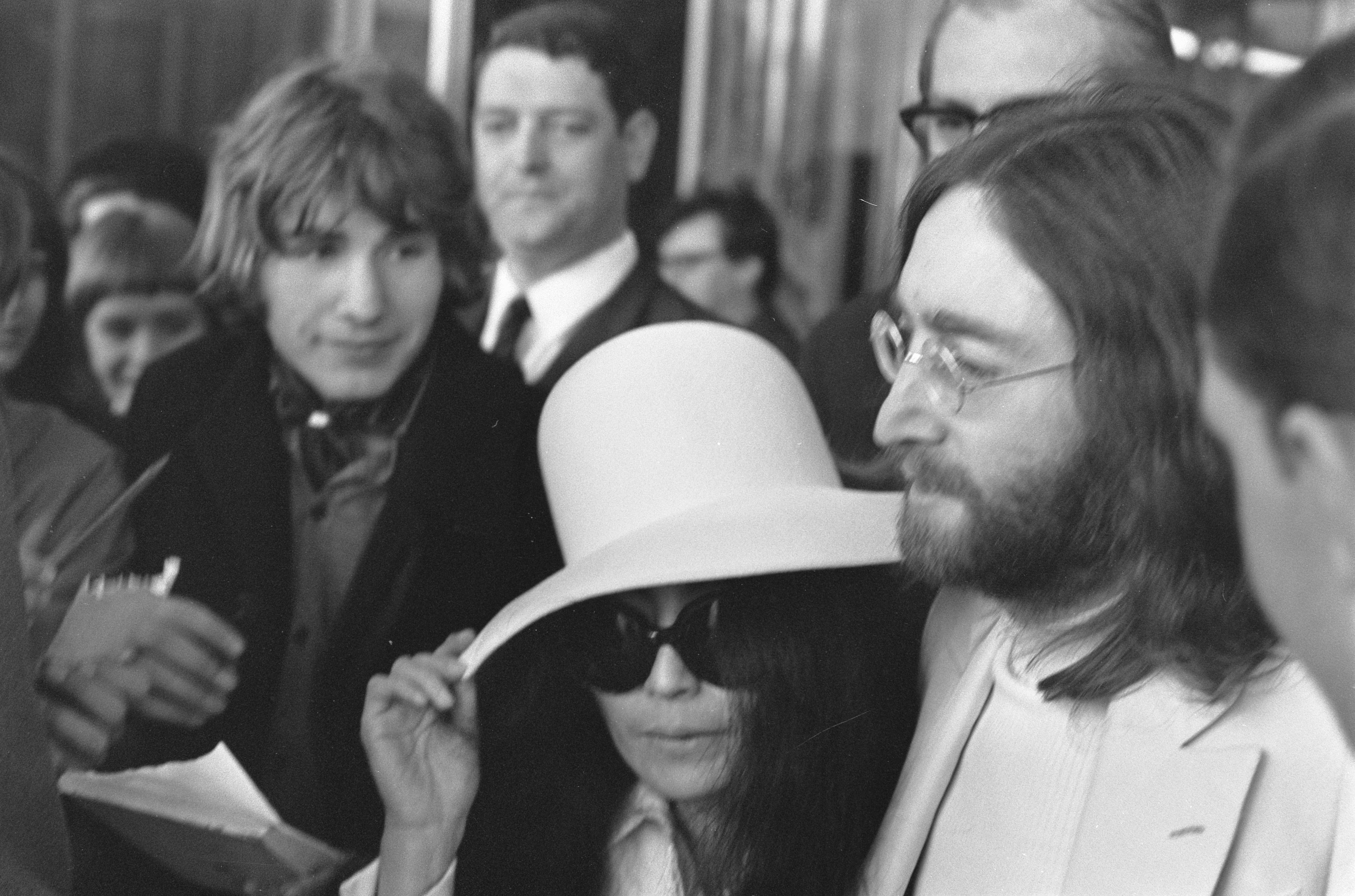 Collectie / Archief : Fotocollectie Anefo Reportage / Serie : [ onbekend ] Beschrijving : John Lennon en echtgenote Yoko Ono verlaten het Hilton Hotel te Amsterdam, omringd door veiligheidsmensen Datum : 31 maart 1969 Locatie : Amsterdam, Noord-Holland Trefwoorden : aankomst en vertrek, echtparen, musici Persoonsnaam : Lennon, John, Ono, Yoko Fotograaf : Koch, Eric / Anefo Auteursrechthebbende : Nationaal Archief Materiaalsoort : Negatief (zwart/wit) Nummer archiefinventaris : bekijk toegang 2.24.01.05 Bestanddeelnummer : 922-2493